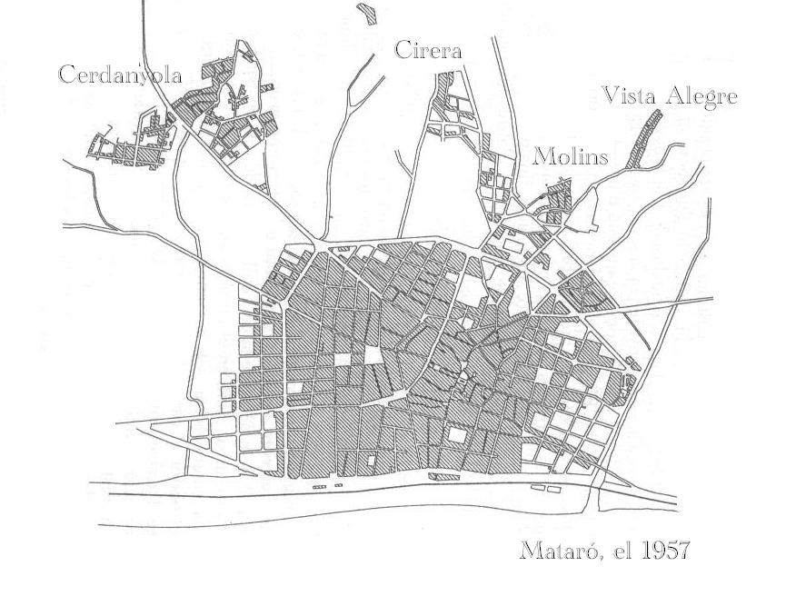 Extensió urbana de la ciutat de Mataró, al 1957